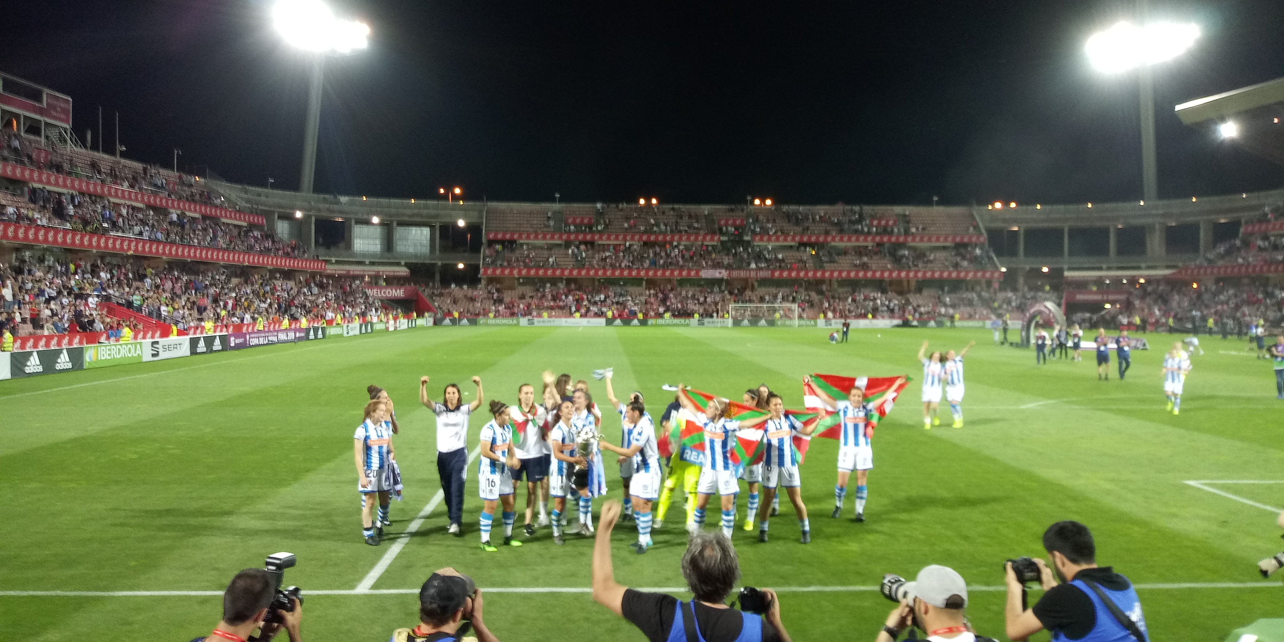 Celebración. Real Sociedad Final Copa de la Reina 2018-19